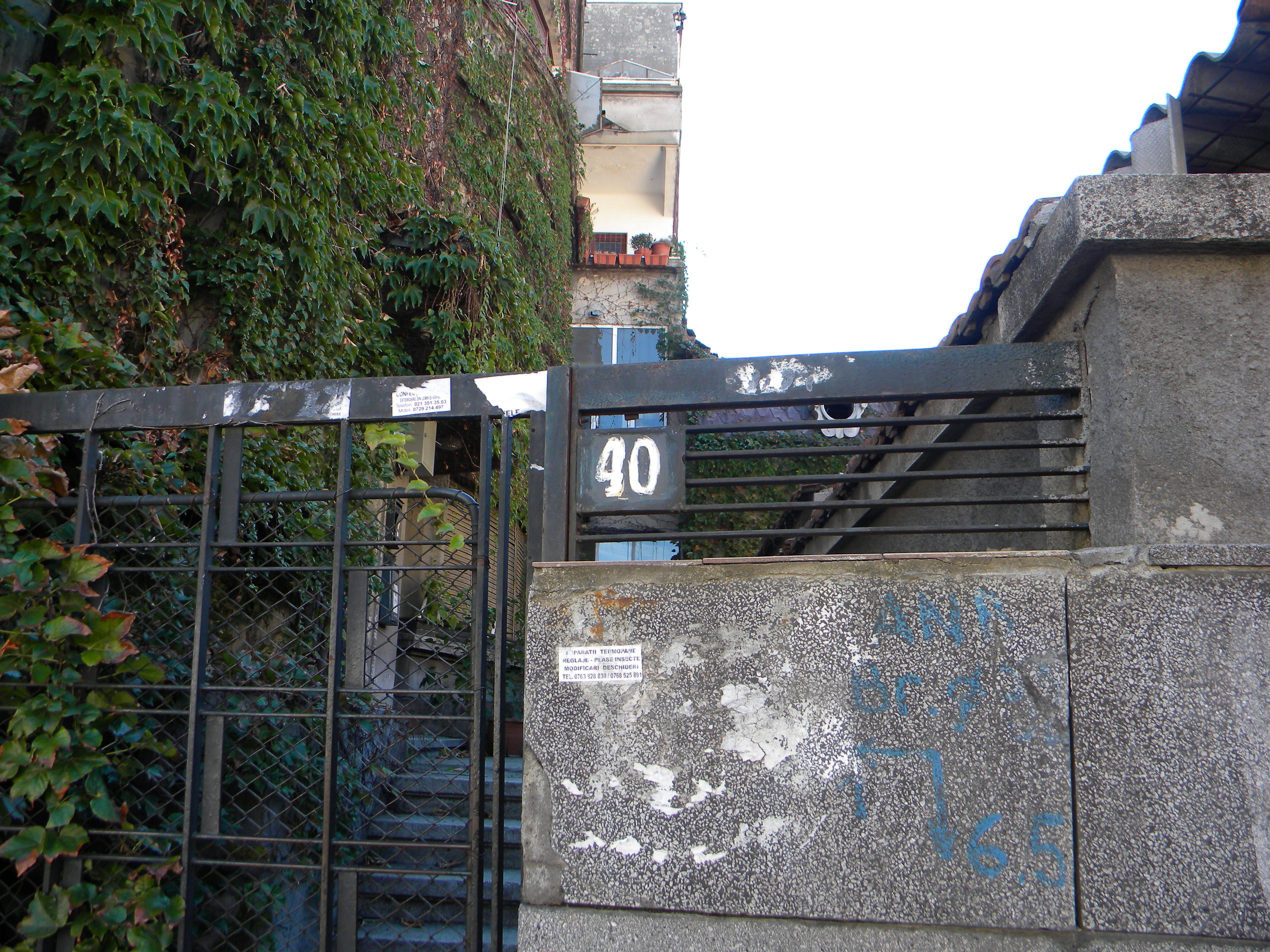 Bucuresti, Romania, Strada Hristo Botev nr. 40 (imobil) sect. 3 (detaliu)